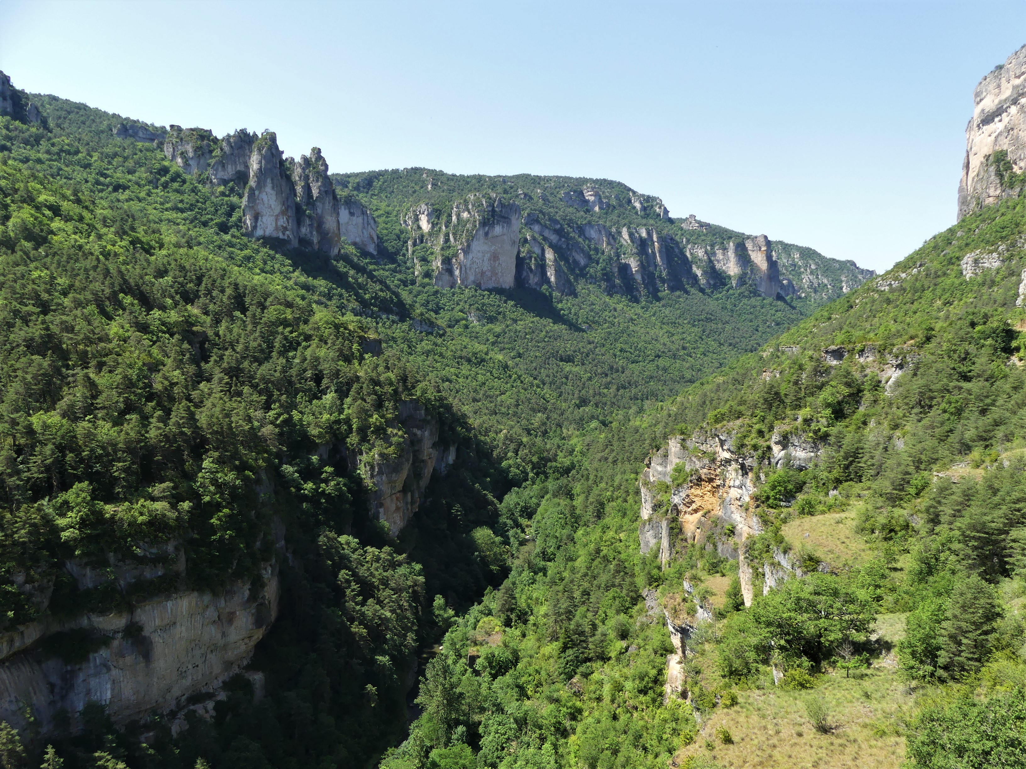 Les gorges de la Jonte entre Saint-Pierre-des-Tripiers (au premier plan à droite, département de la Lozère) et Veyreau (en face, département de l'Aveyron), France. Vue prise en direction de l'aval depuis la maison des Vautours.